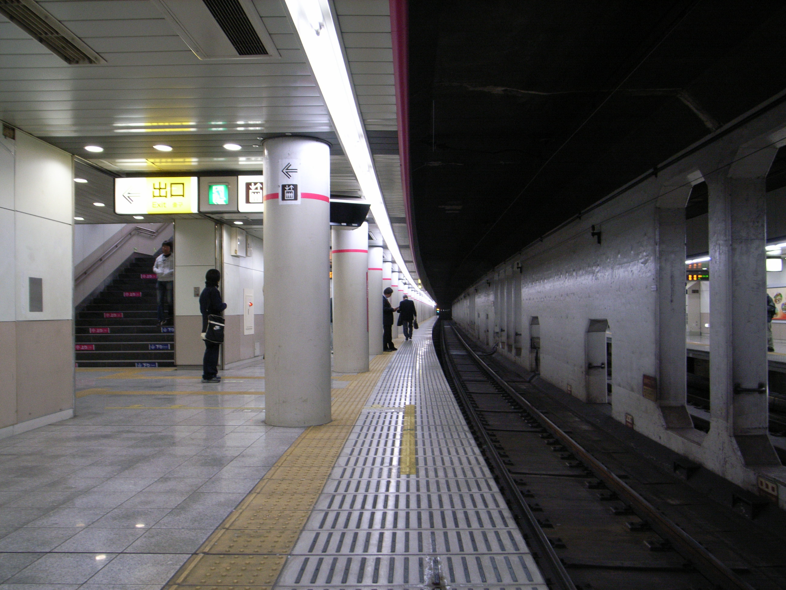 京王新線幡ヶ谷駅上りプラットホーム